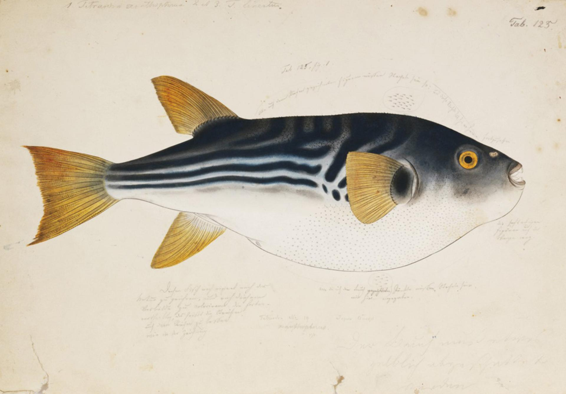 Takifugu xanthopterus (Temminck and Schlegel)